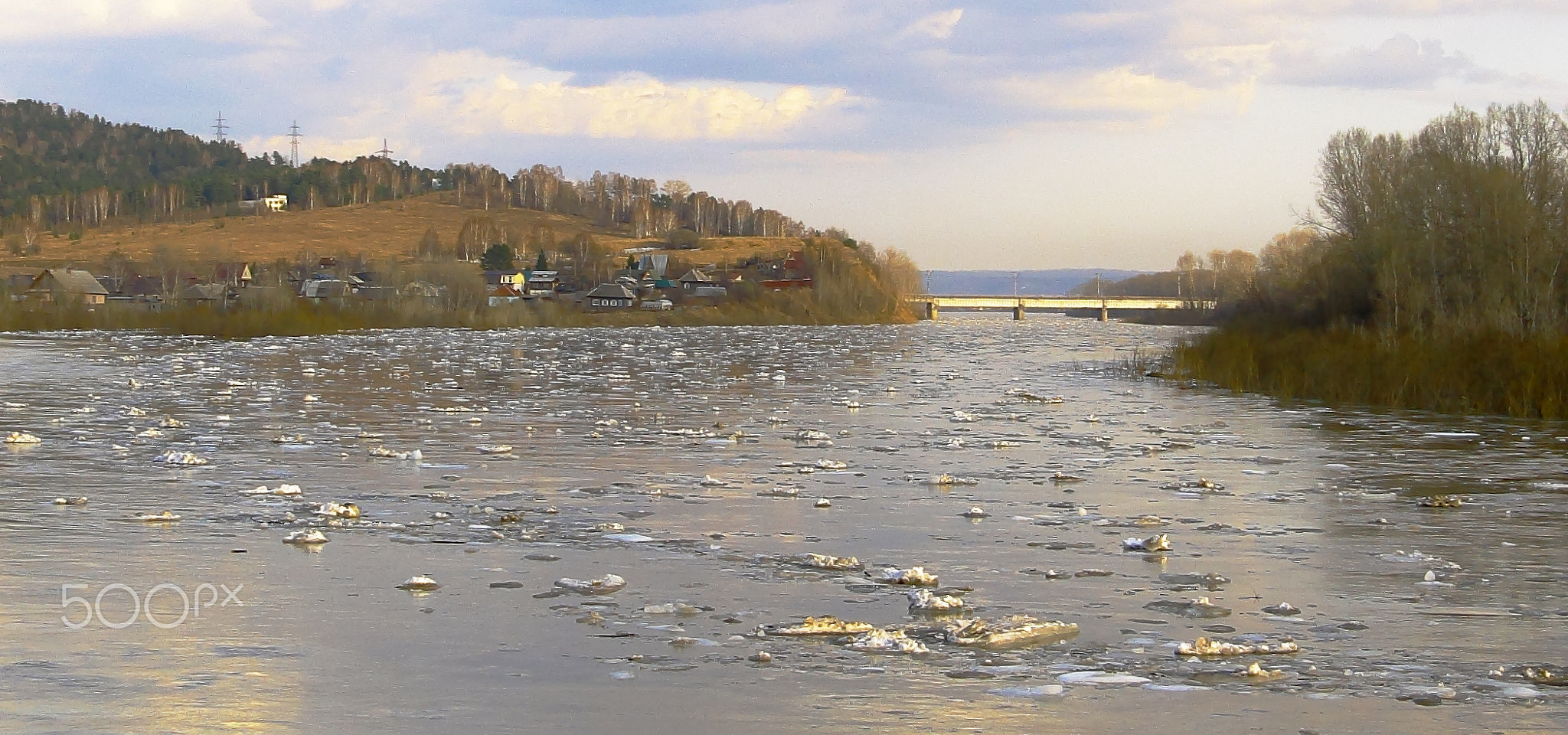 500px provided description: ????????? ???????, ???? ???? ?? ????. [#????? ???? ??????? ??????? ???? ??????? ?????]